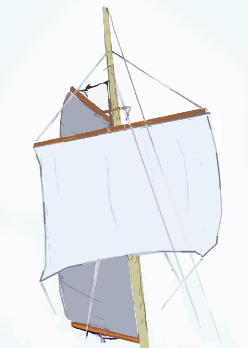 En bild på en bredfock